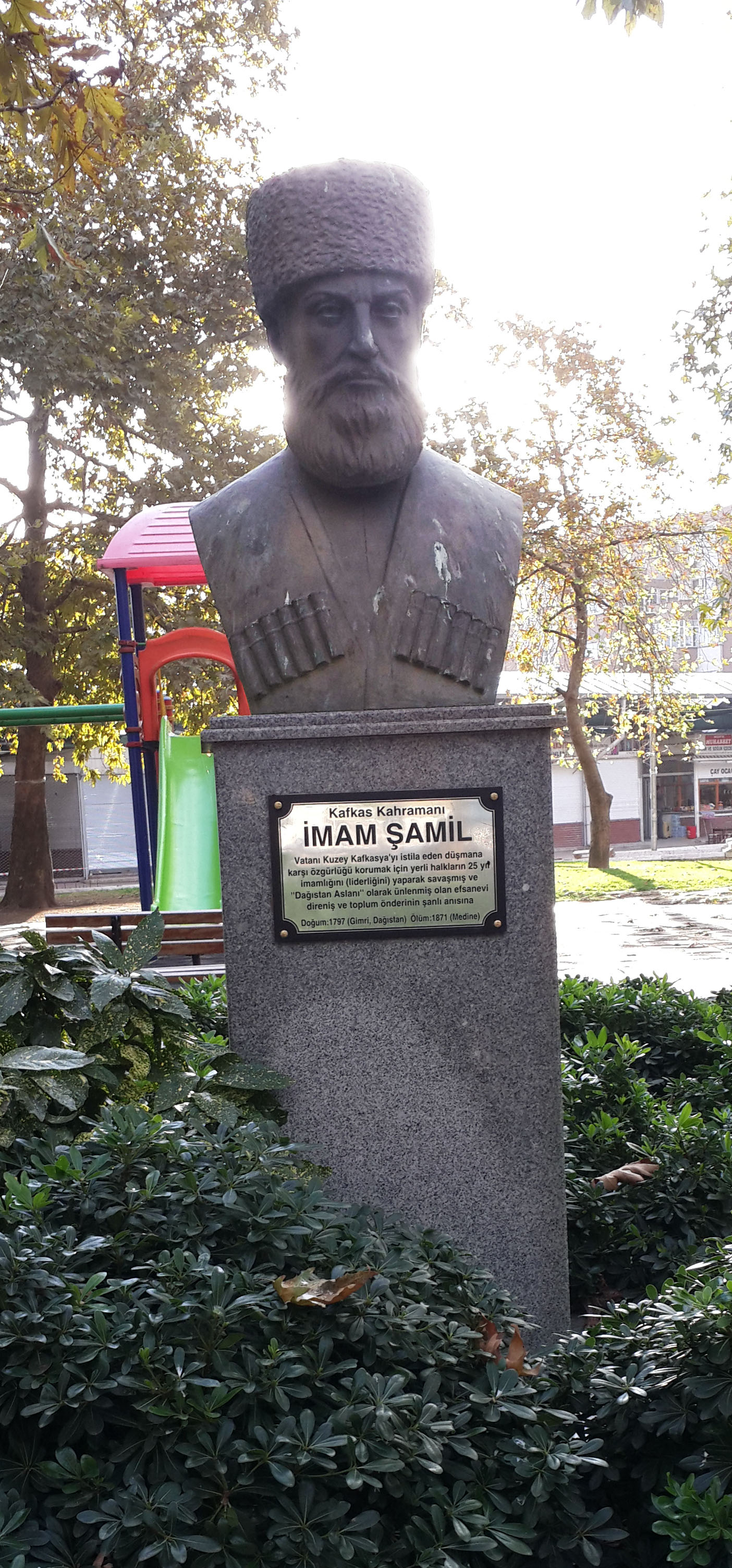 Бюст имама Шамиля в г. Ялова